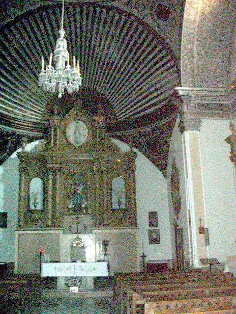 Interior de la iglesia de Olocau del Rey (Castellón, España)